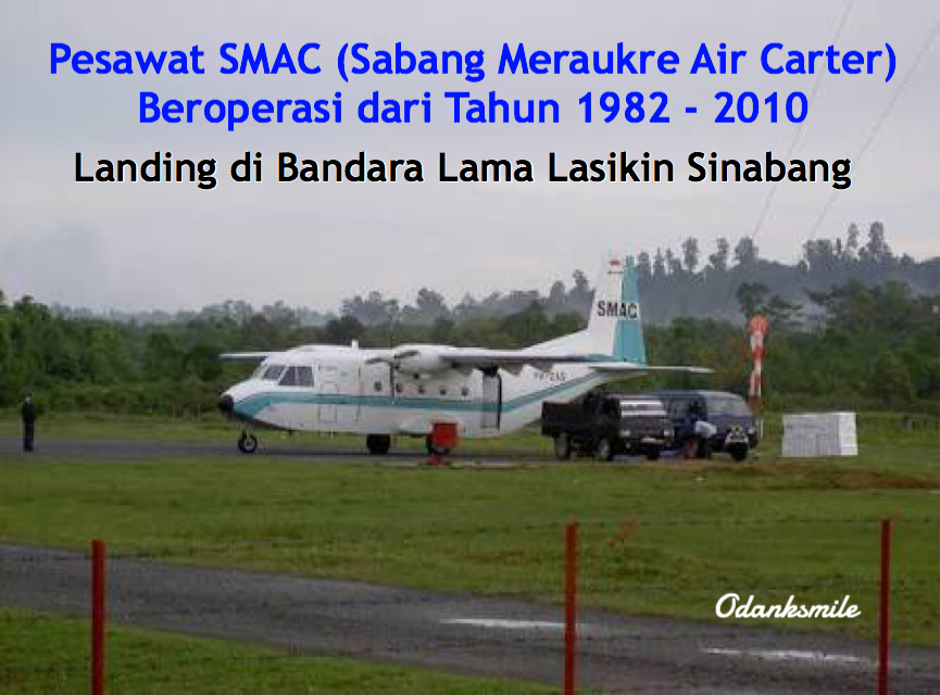 Angkutan Udara pertama di Kabupaten Simeulue yang melayani rute penerbangan : Medan - Sinabang - Meulaboh - Banda Aceh sejak dari tahun 1982 - 2010